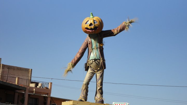 Una muestra del Raspajo torreño del año 2011.